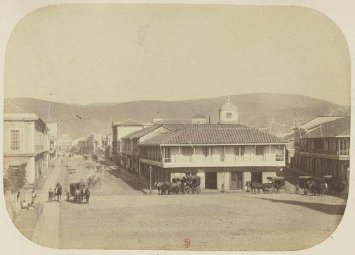 Foto de Valparaíso Antiguo